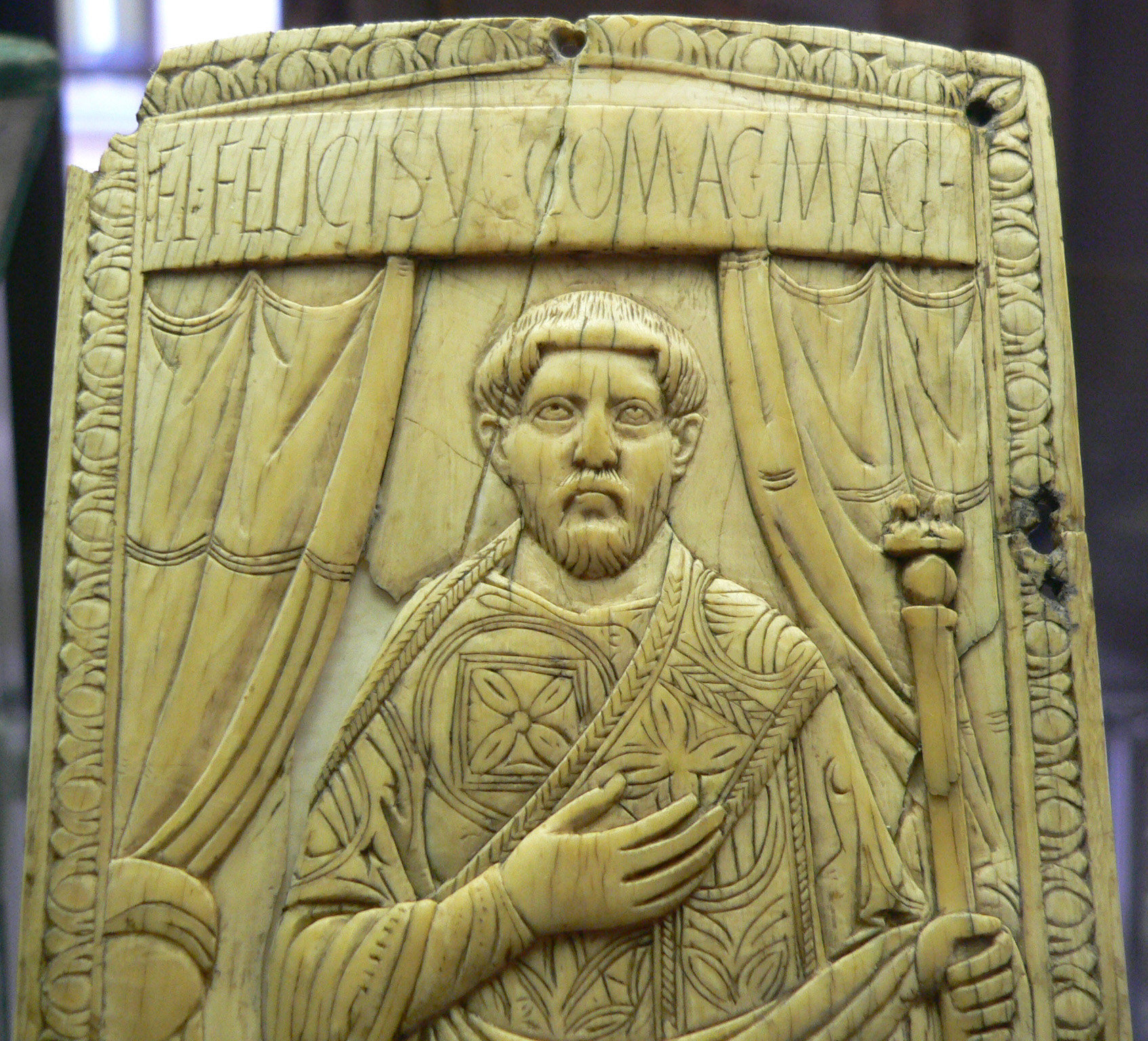 Feuillet du diptyque de Flavius Felix Flavius Felix, consul en 428, Rome, Ivoire d'éléphant, Ancien trésor de l'Abbaye Saint-Junien de Limoges